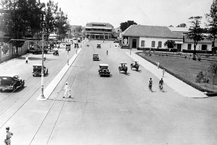 Repronegatief. Weg "Pasar Besar" , Soerabaia, 1930